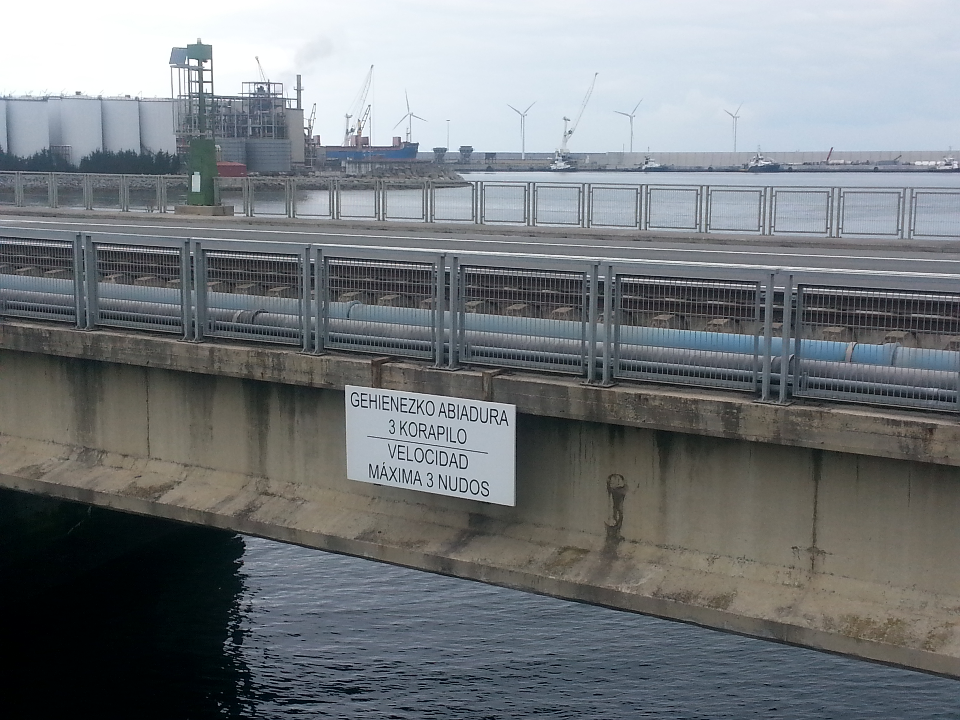 Zierbena. Portua.